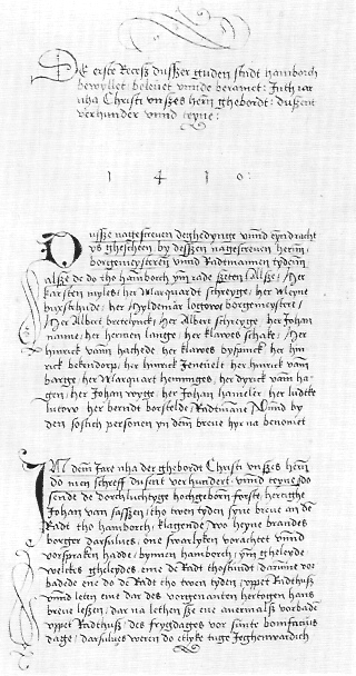 Der „Erste Rezeß“ von 1410, in dem erstmals Mitwirkungsmöglichkeiten der Bürger der Stadt Hamburg festgeschrieben wurden.